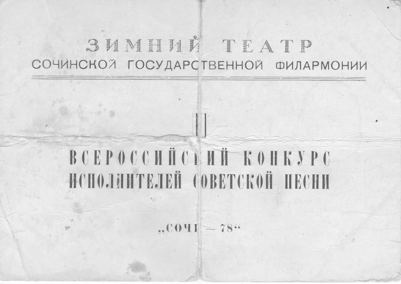 Пропуск участника конкурса в Зимний театр на Всероссийский конкурс исполнителей советской песни Сочи-78. главное изображение. ЧБ пропуск 1978 года (оригинал пропуска в цвете). Из архива артистов ВИА "Лейся, песня".